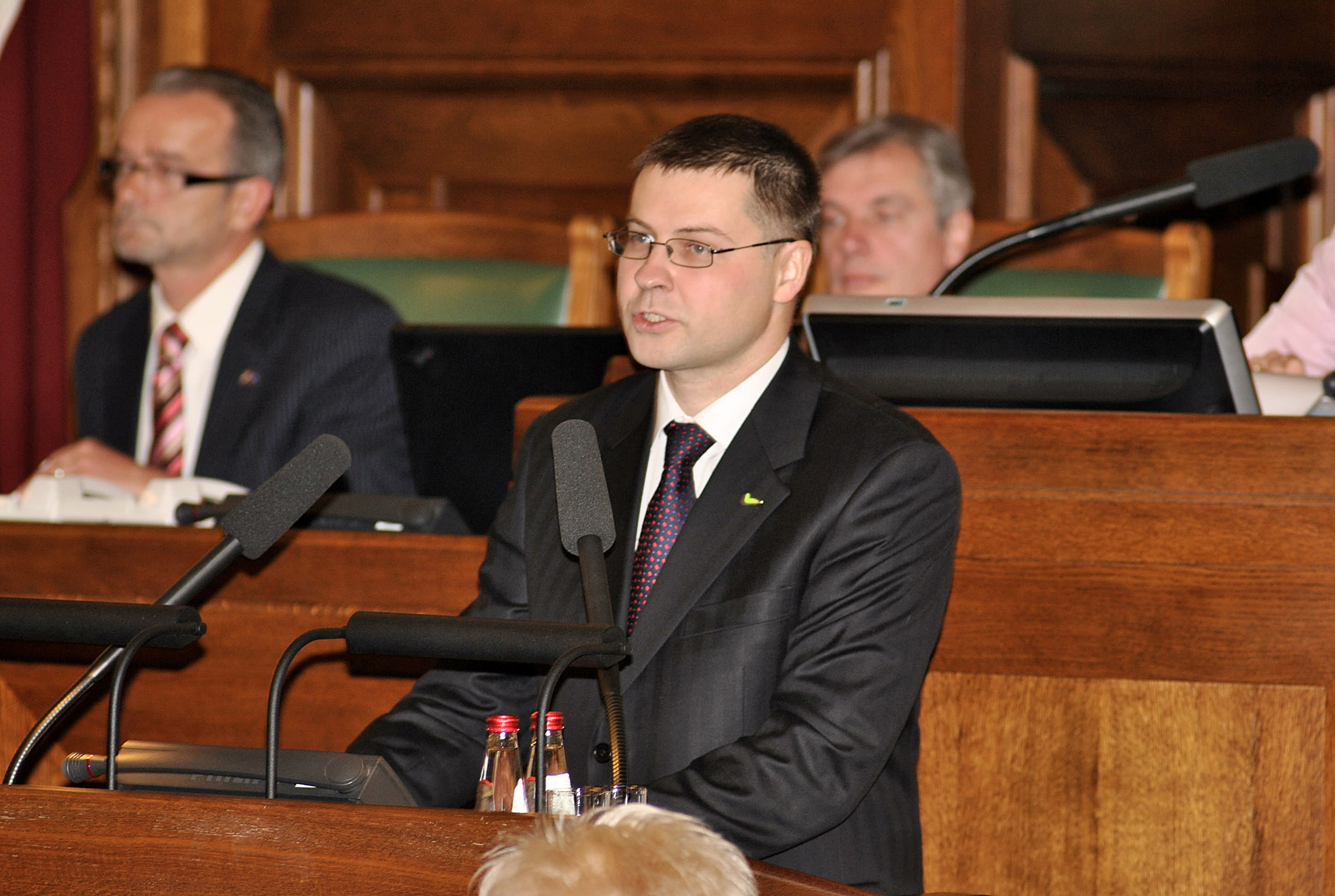 2010.gada 3.novembris. Jaunās valdības apstiprināšana. Attēlā: Ministru prezidenta amata kandidāts, deputāts Valdis Dombrovskis. Foto: Saeima